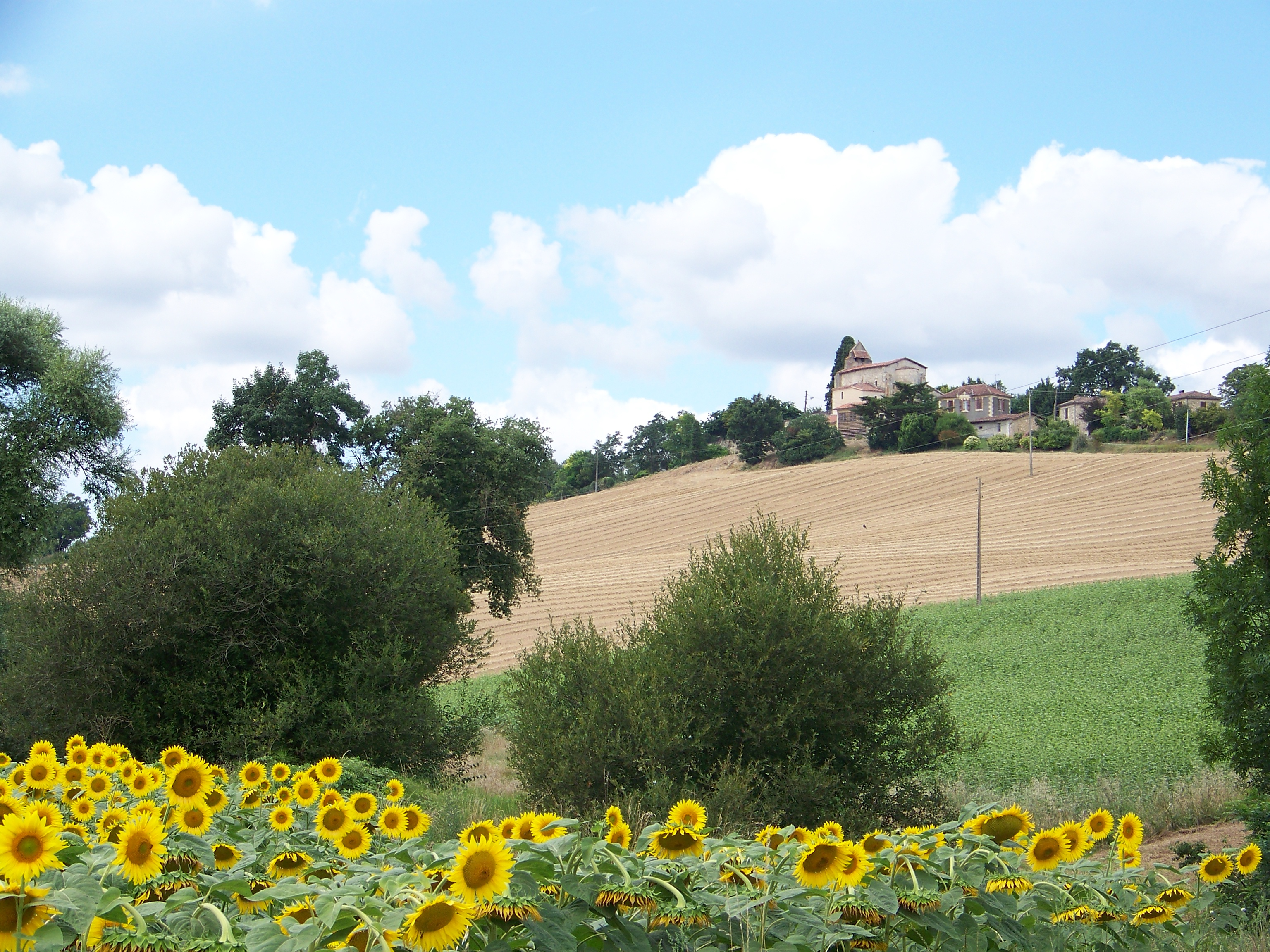 Village de Mérens (Gers) vu depuis la route de Peyrrusse-Massas et Roquelaure